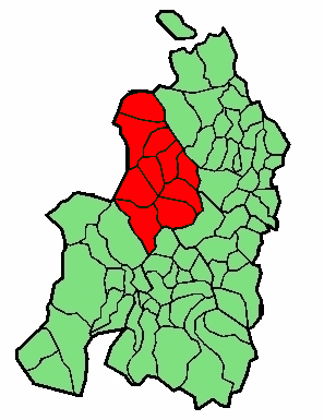 aipaturiko eskualdearen kokapena Nafarroa Beherean